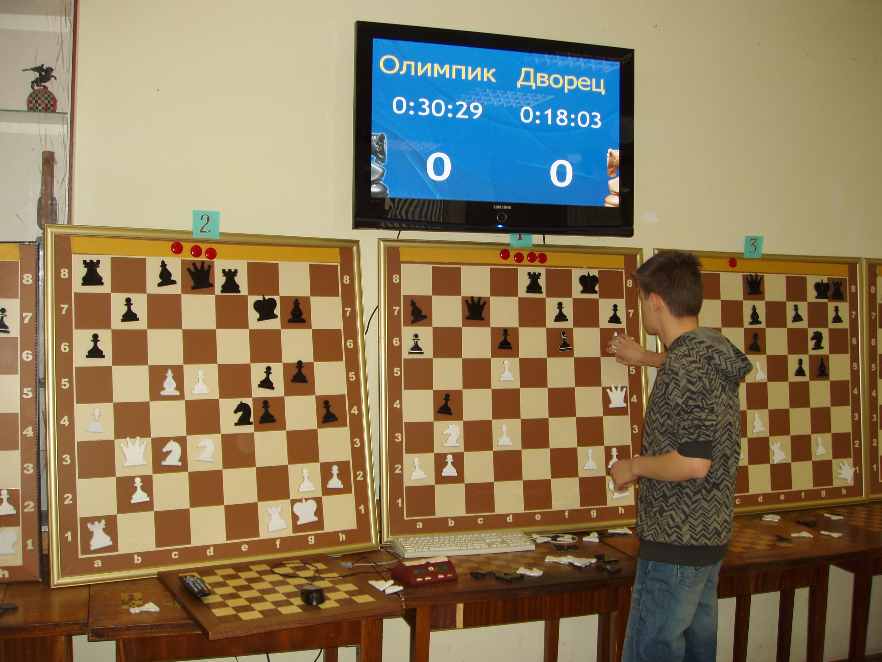 Ветви в Деловых шахматах: игровые шахматные позиции с указанием их рейтингов, установленные на демонстрационных досках. 1-й Чемпионат Москвы по Деловым шахматам 6.12.2008.